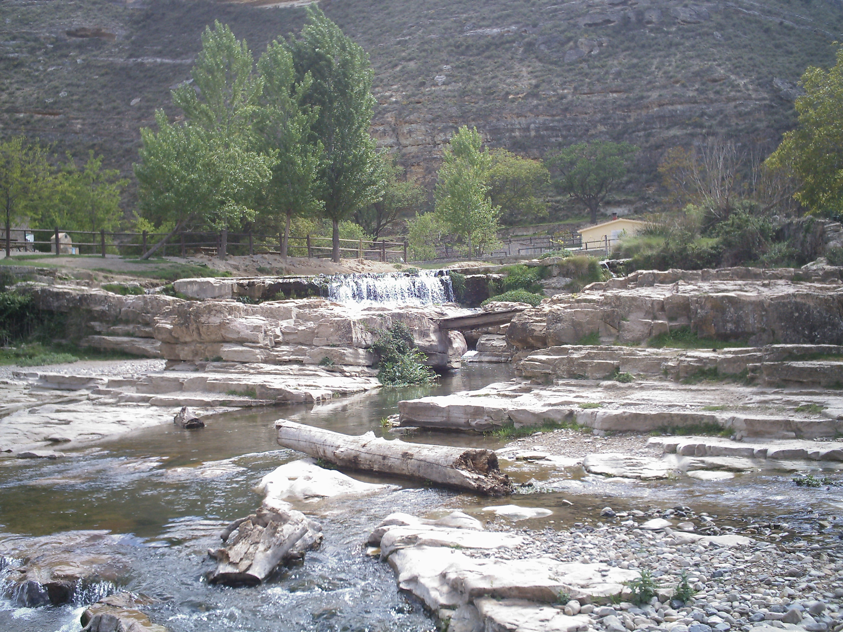 Pozo Largo, Río Alhama en La Rioja (Spain)